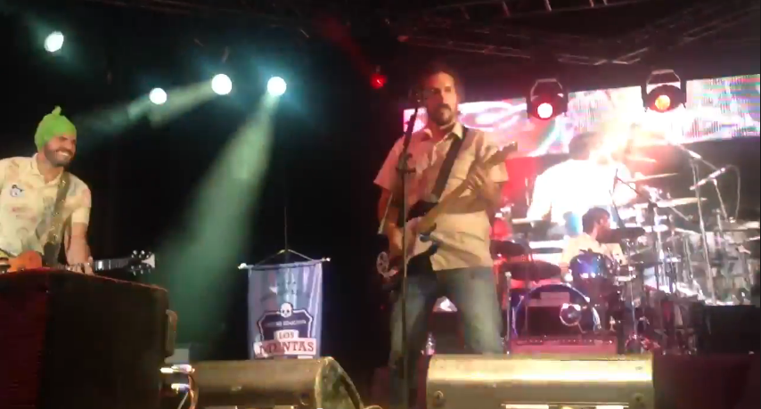 Los Mentas en el festival de Nuevas Bandas 2012